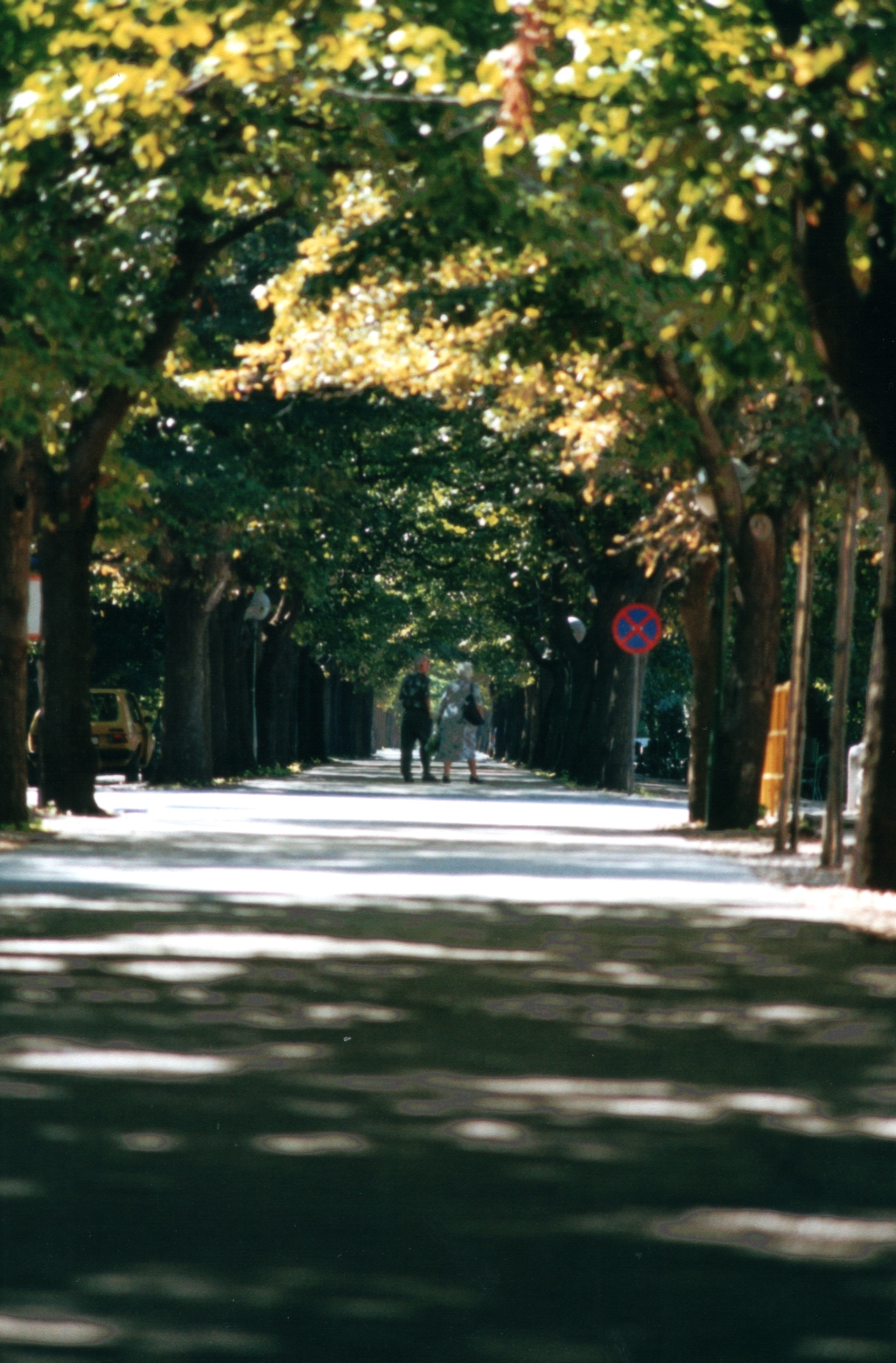 Blato na Korčuli